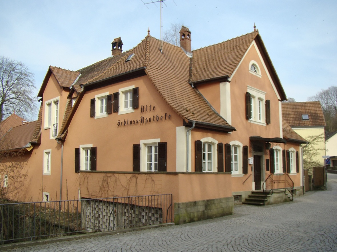 Alte Schlossapotheke in Angelbachtal-Eichtersheim